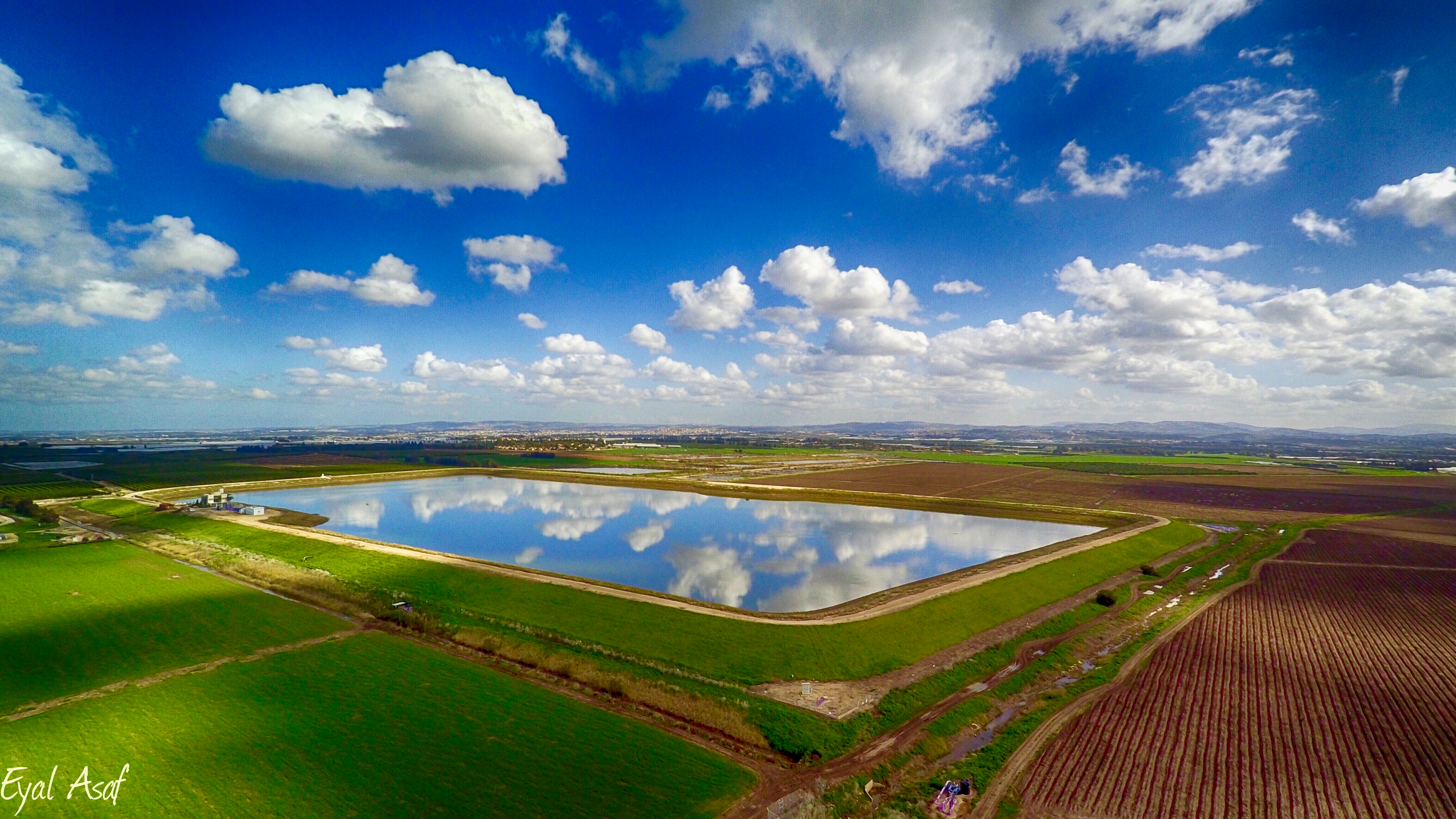 מאגר המים הצפוני הגדול שבעמק חפר